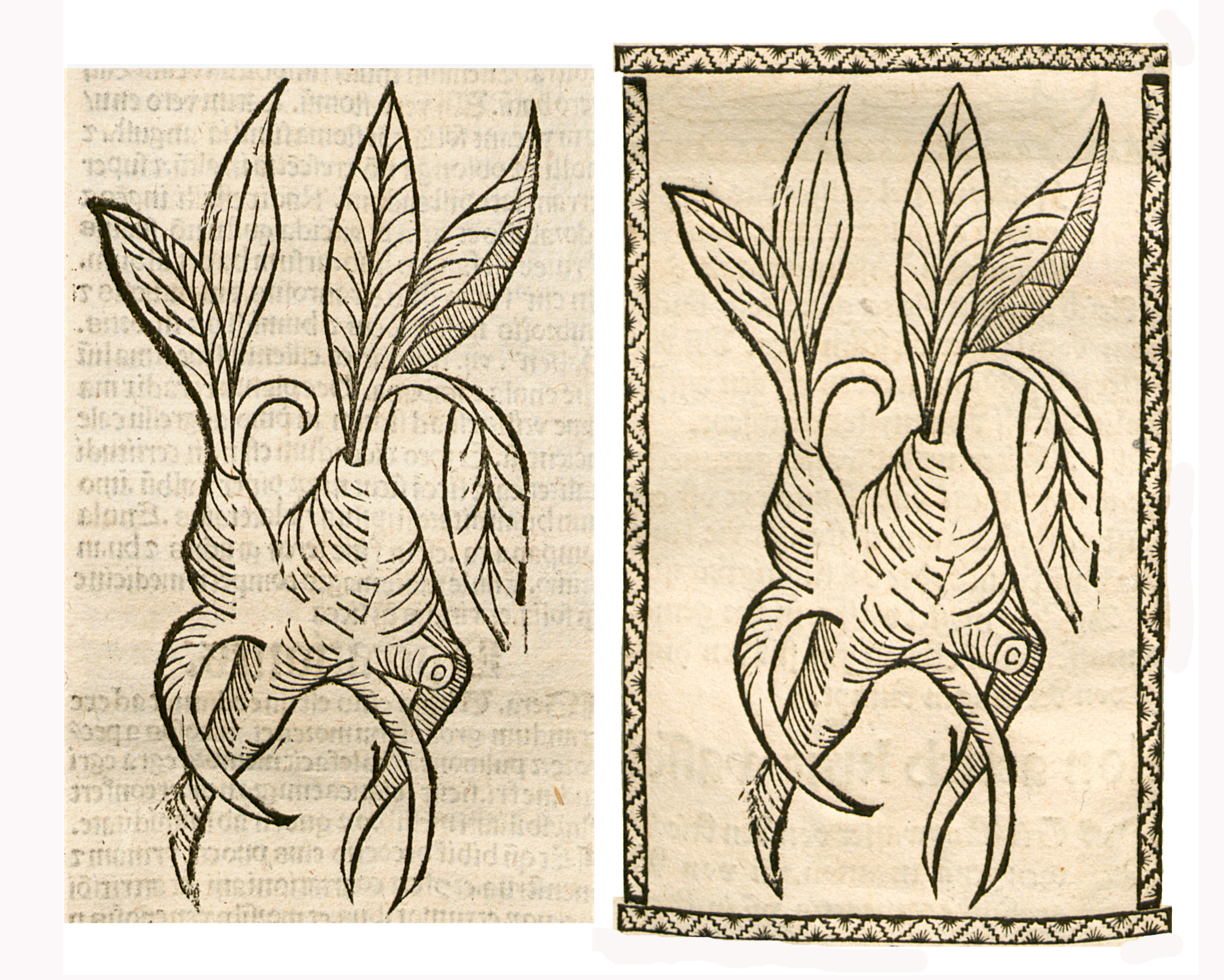 Abbildung von: Alant-Wurzel